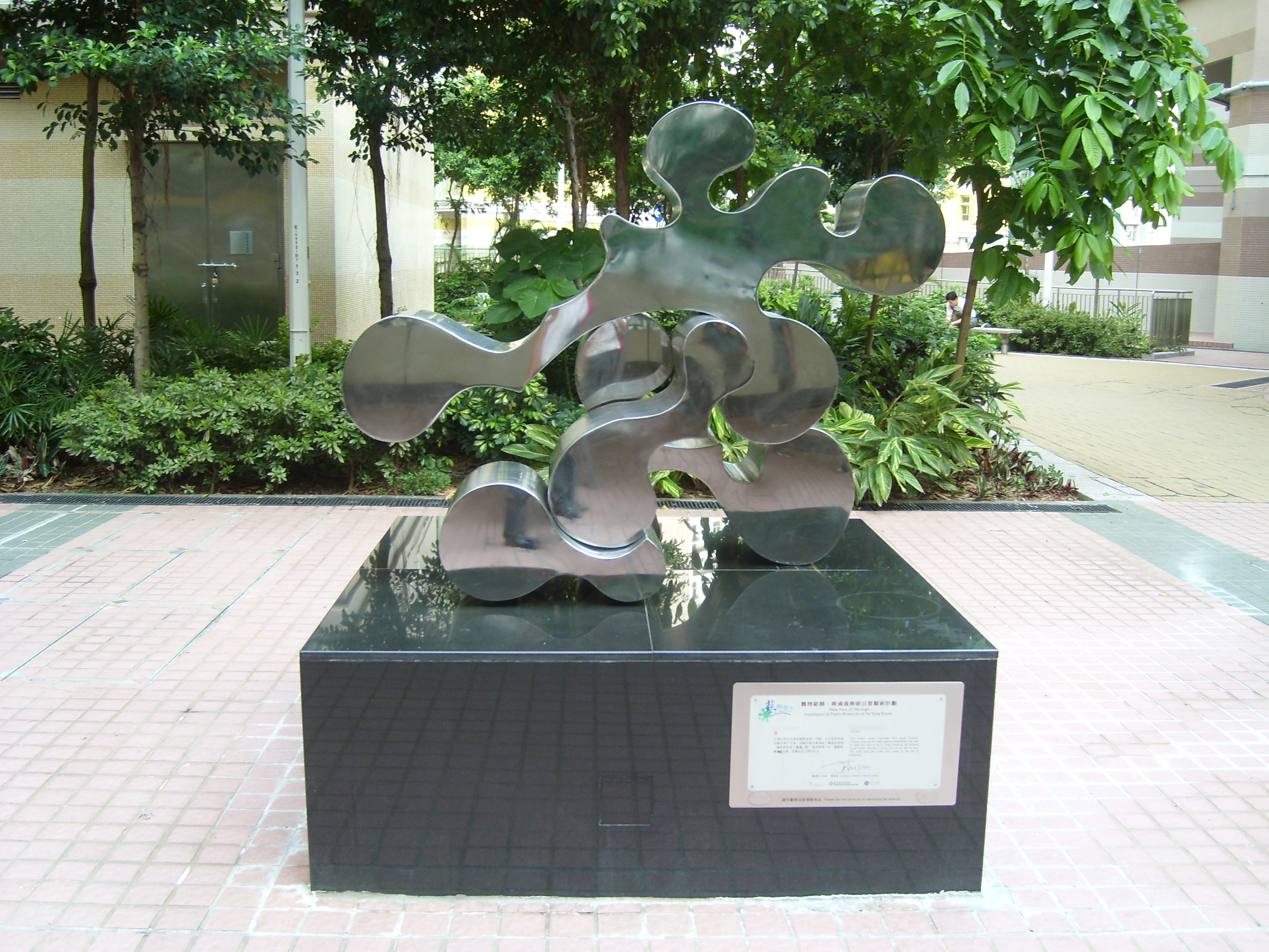 曾章成公眾藝術品《源Origin》,現置於東涌藝術徑 Origin Public artwork by Johnson Cheung Shing TSANG